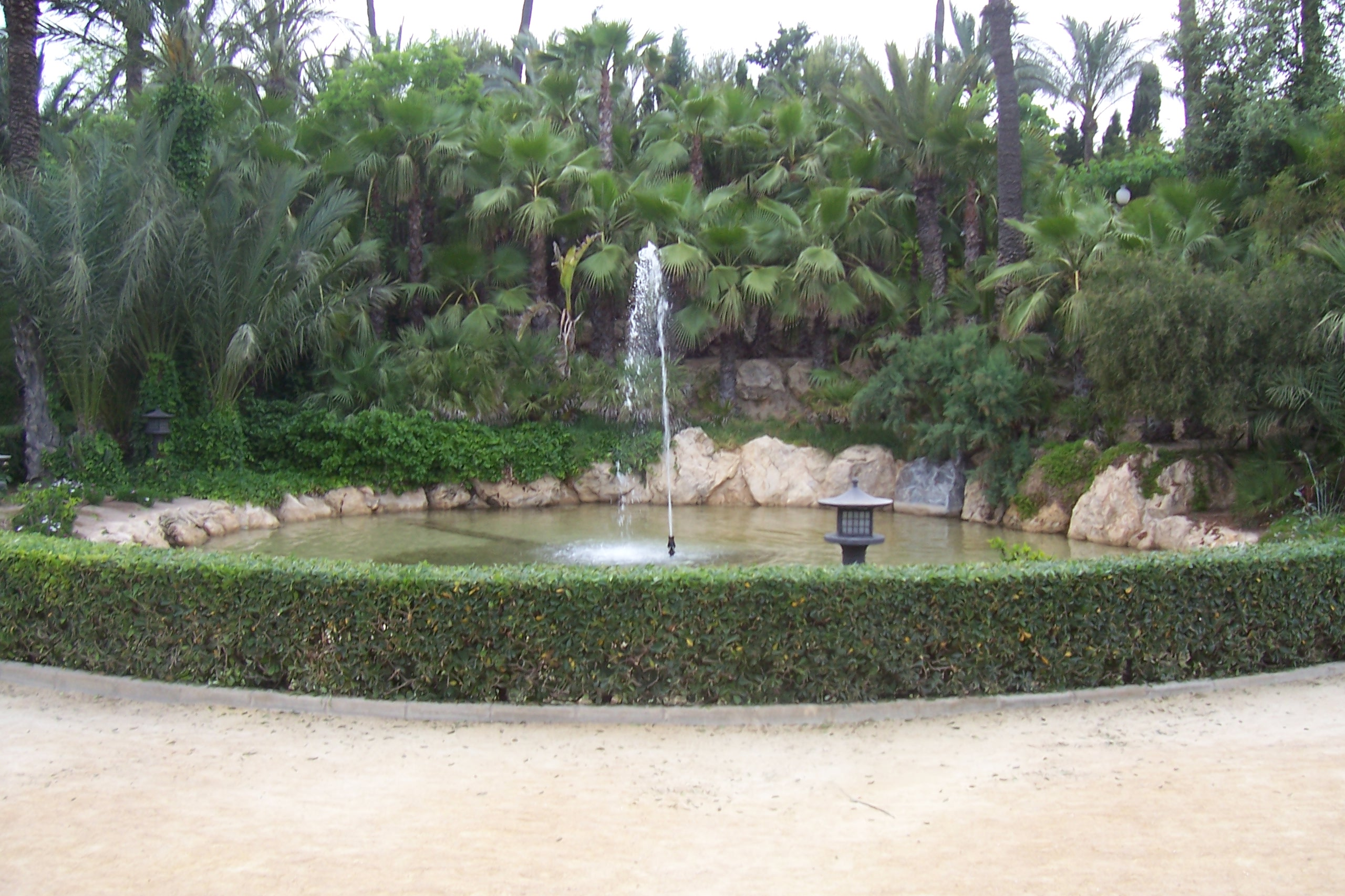 Foto de la fuente del palmeral